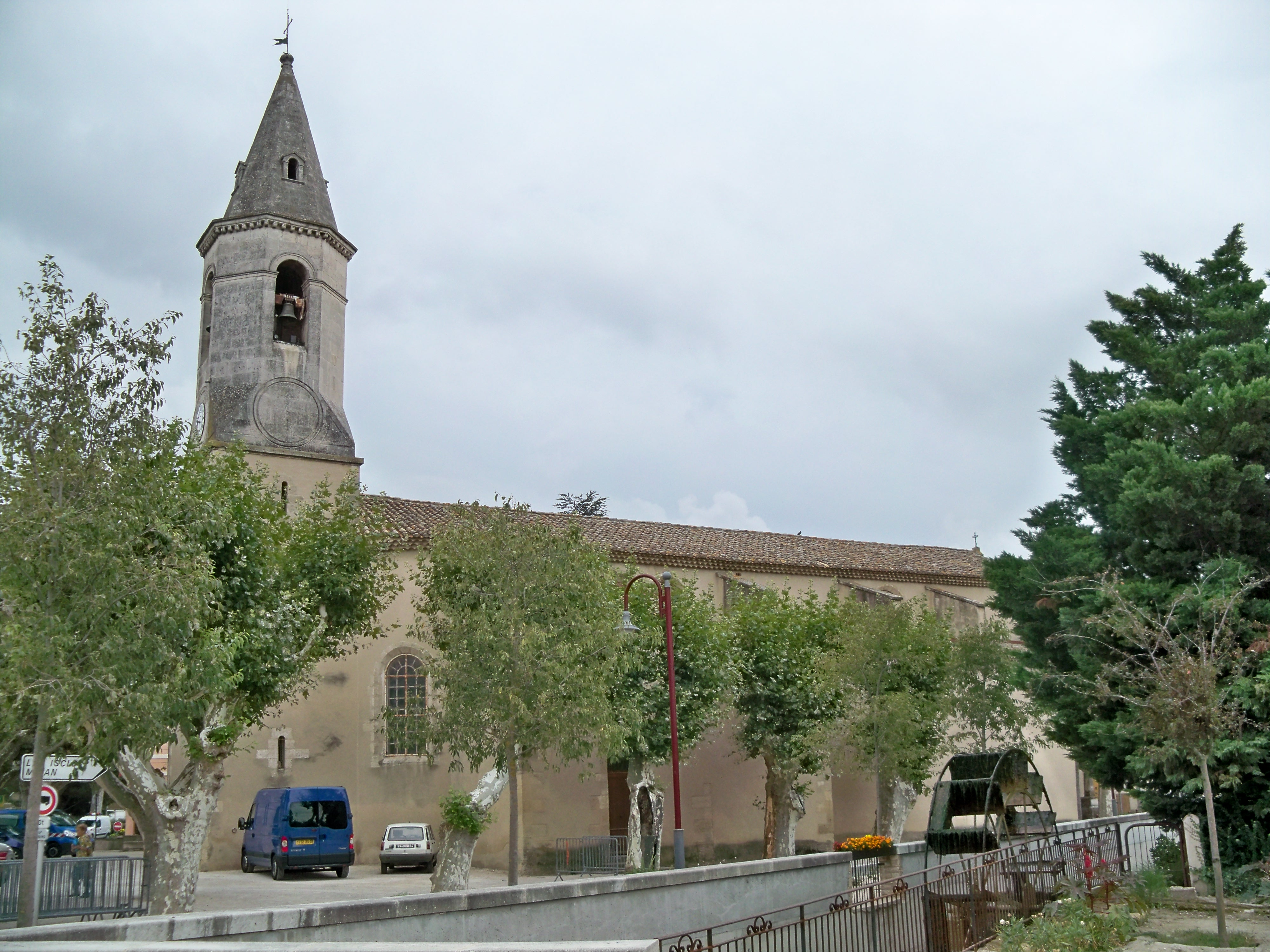 église de Cheval-Blanc, Vaucluse, France